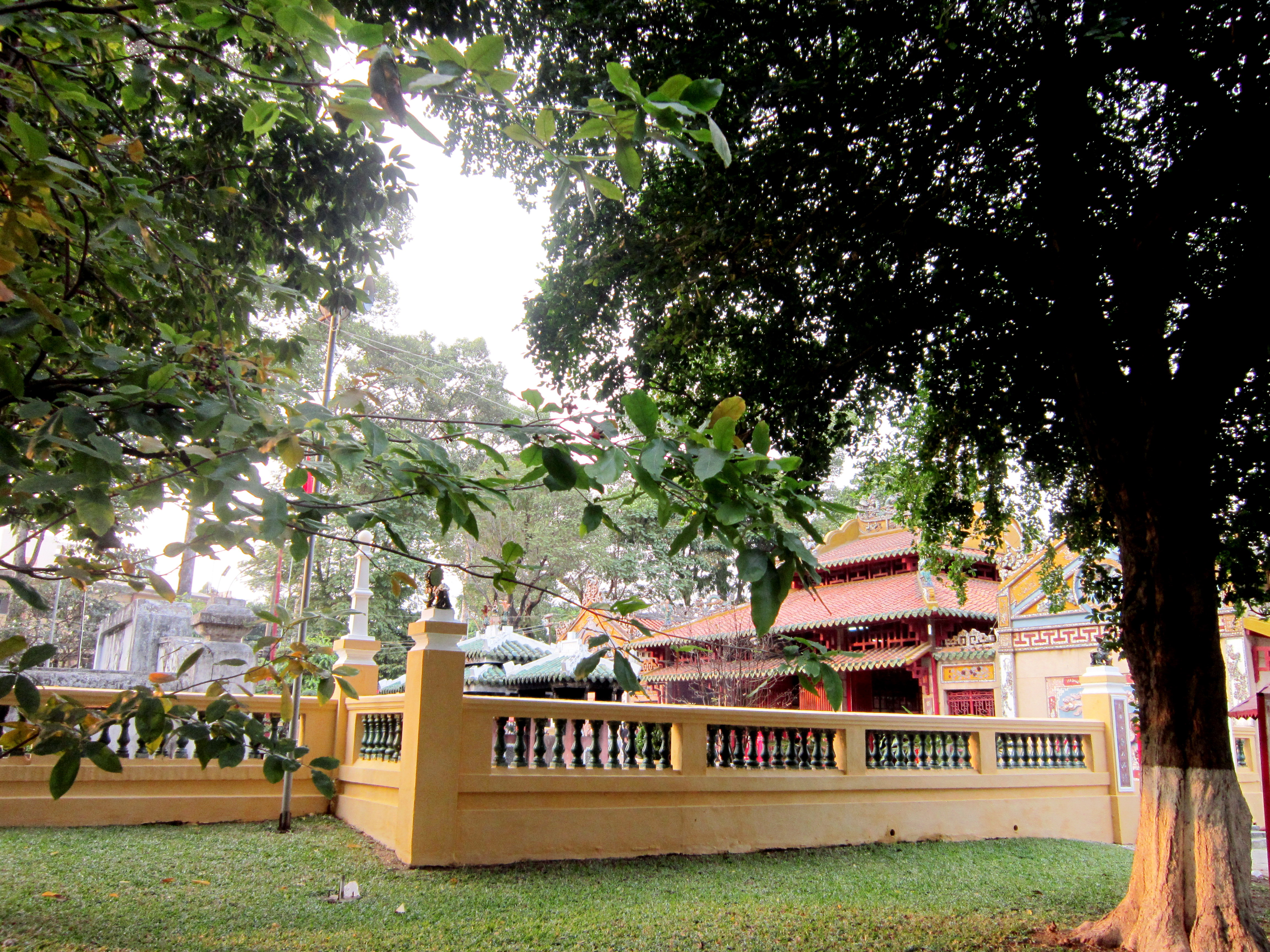 Lăng Ông Bà Chiểu (gồm mộ và đền thờ tướng Lê Văn Duyệt) ở quận Bình Thạnh, TP. Hồ Chí Minh, Việt Nam.